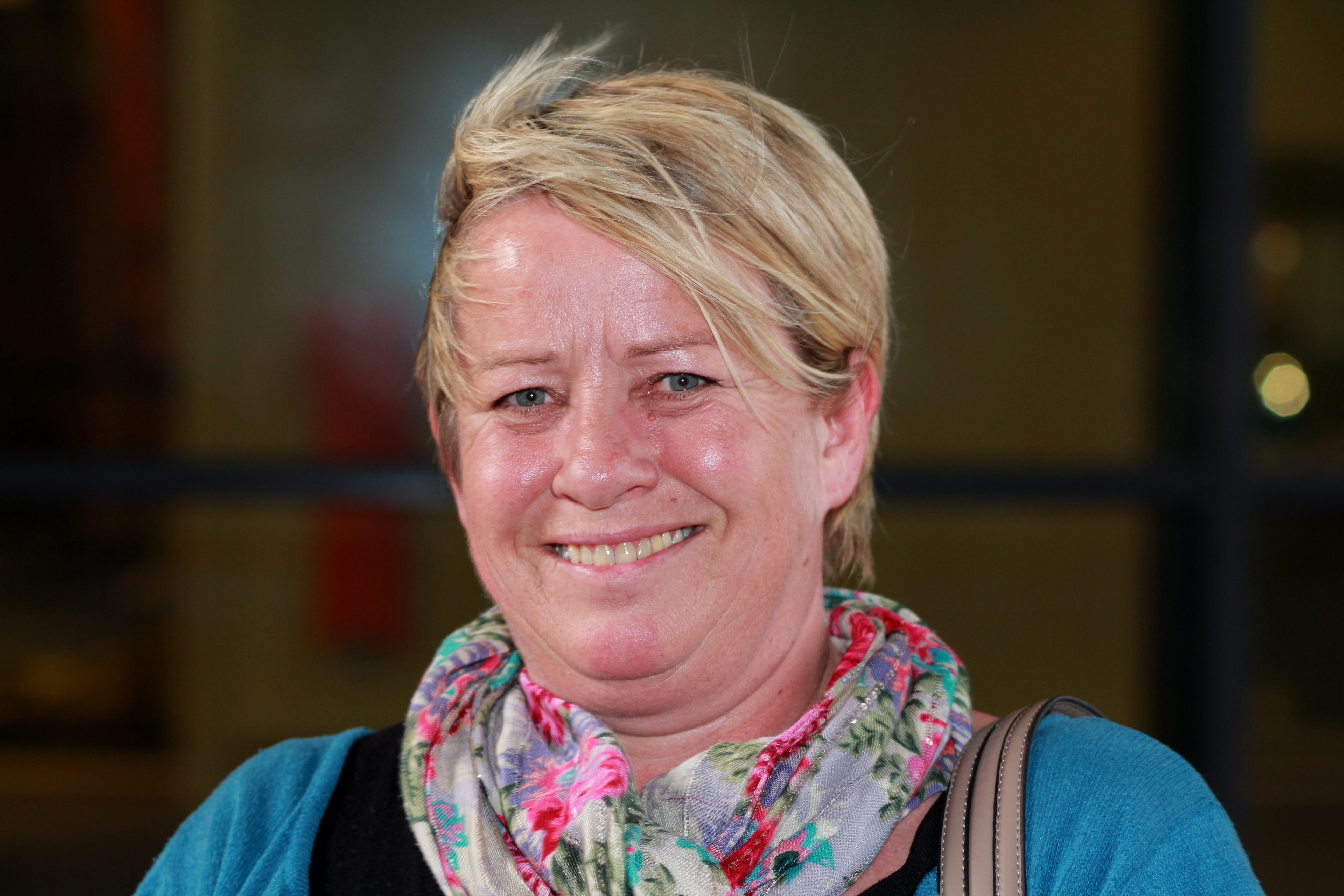 Eirin Kristin Sund, i Arkeologisk museum i Stavanger 2010